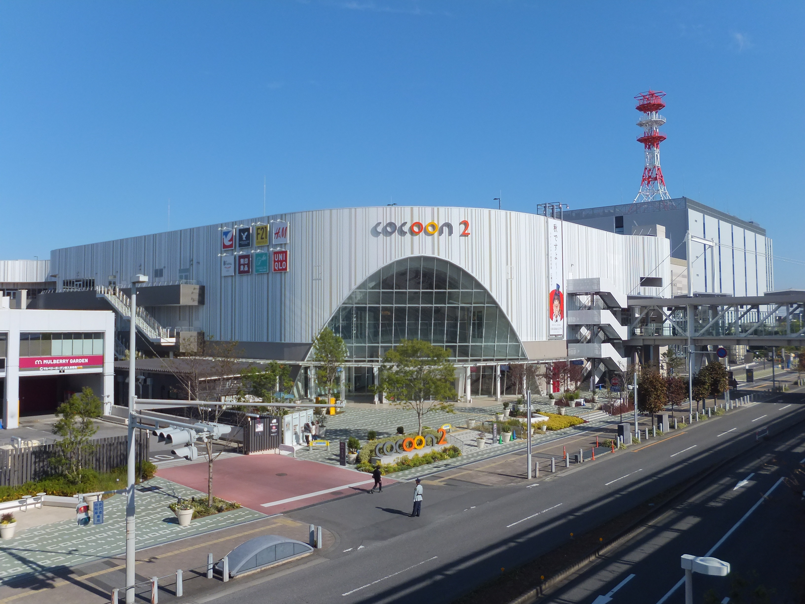 コクーンシティ、cocoon2。イトーヨーカドー大宮店他が入る。2015年完成